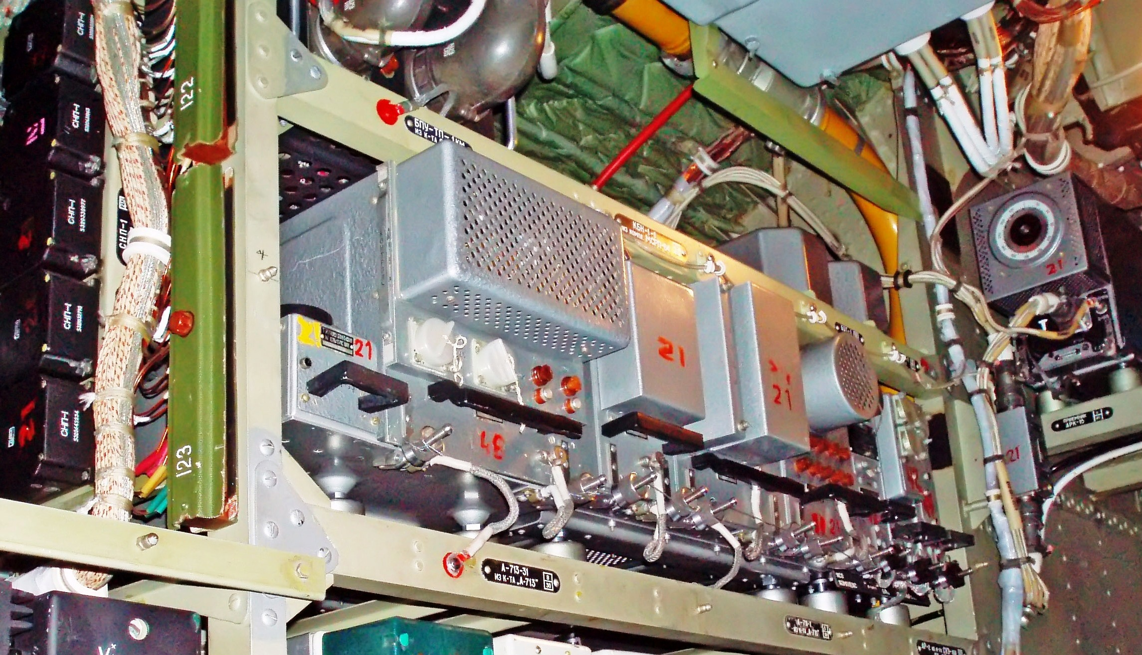 оборудование самолёта